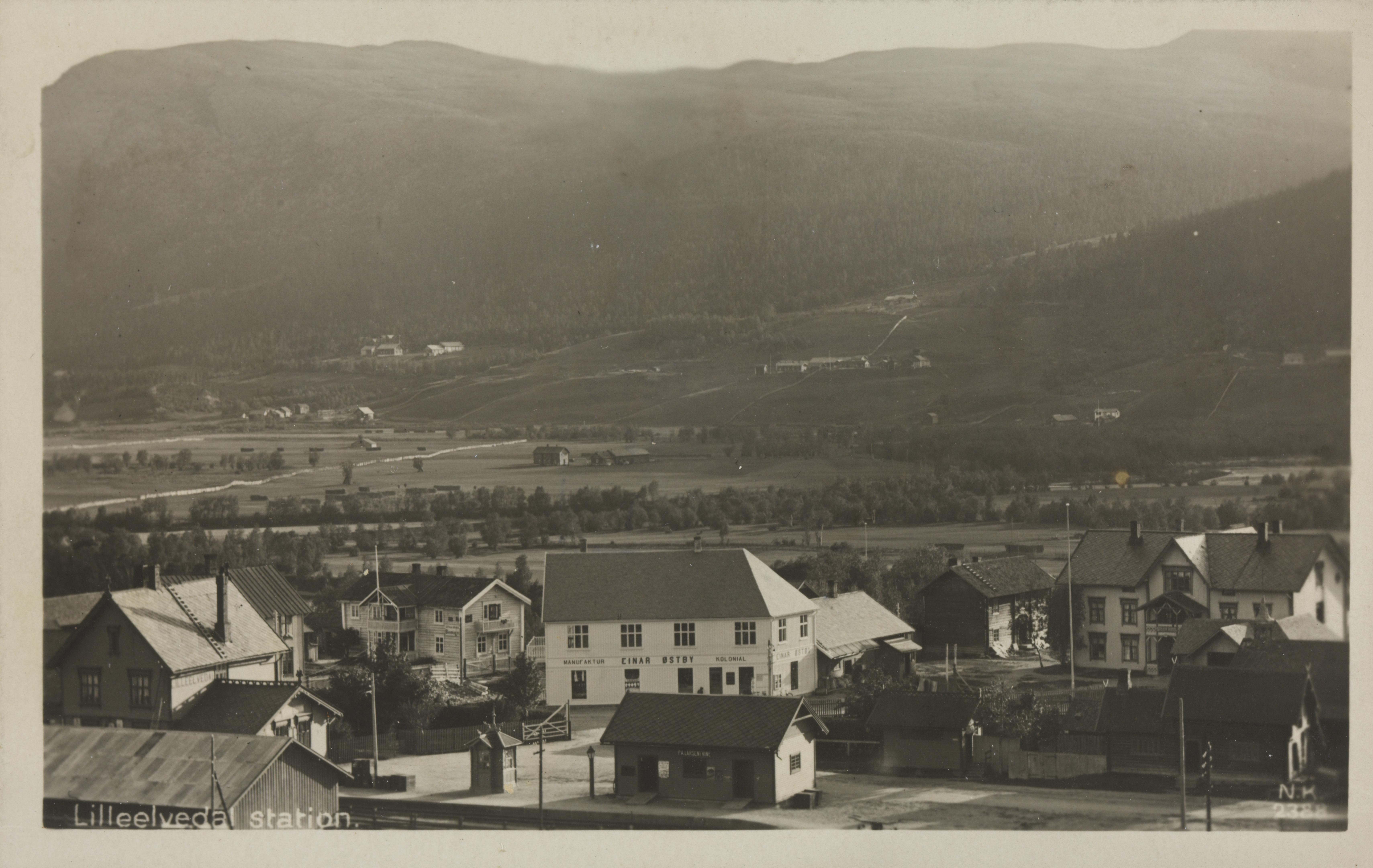 Bildet er hentet fra Nasjonalbibliotekets bildesamling Alvdal, Hedmark